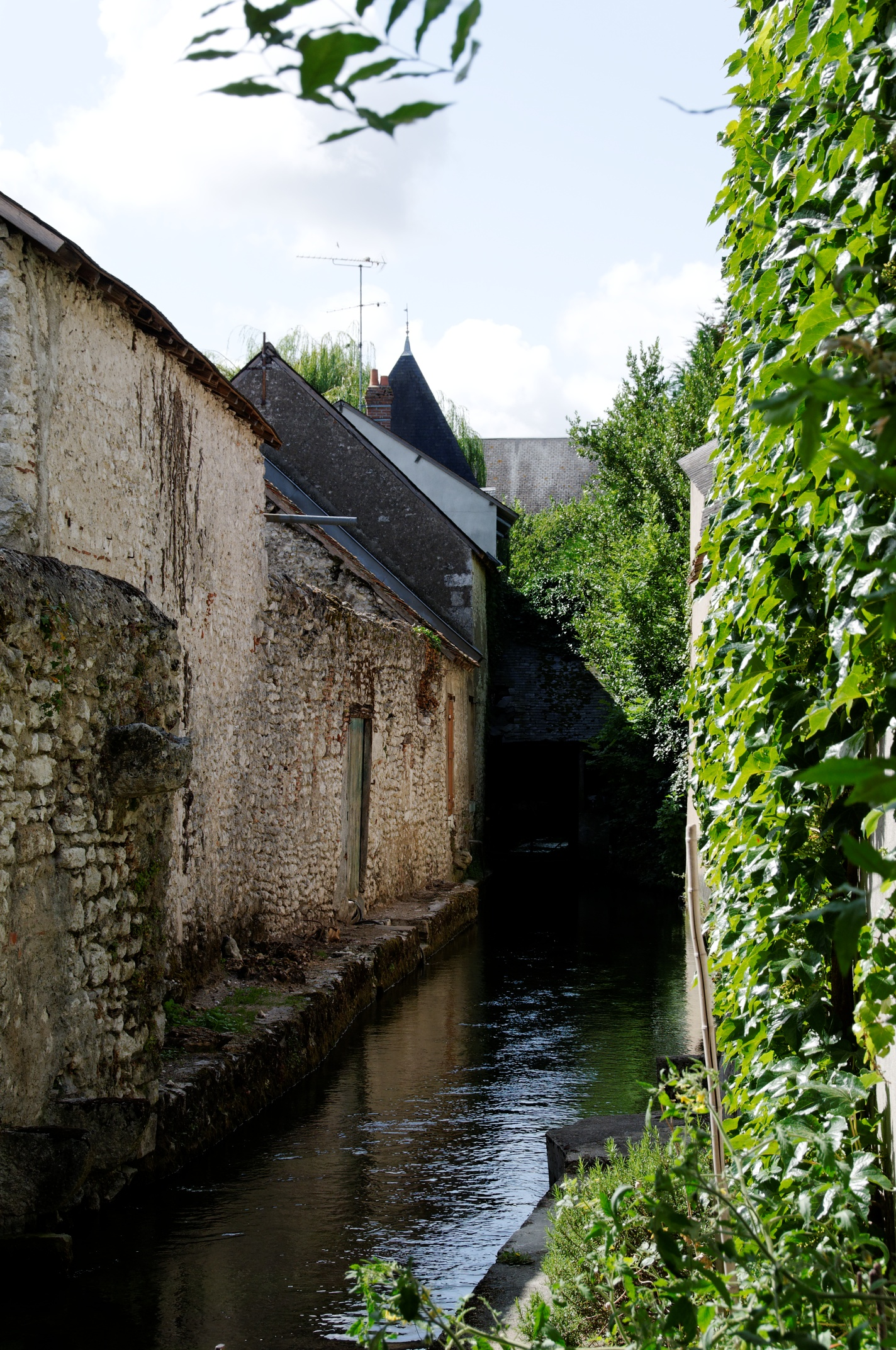 Les Mauves, Meung-sur-Loire, Loiret, France